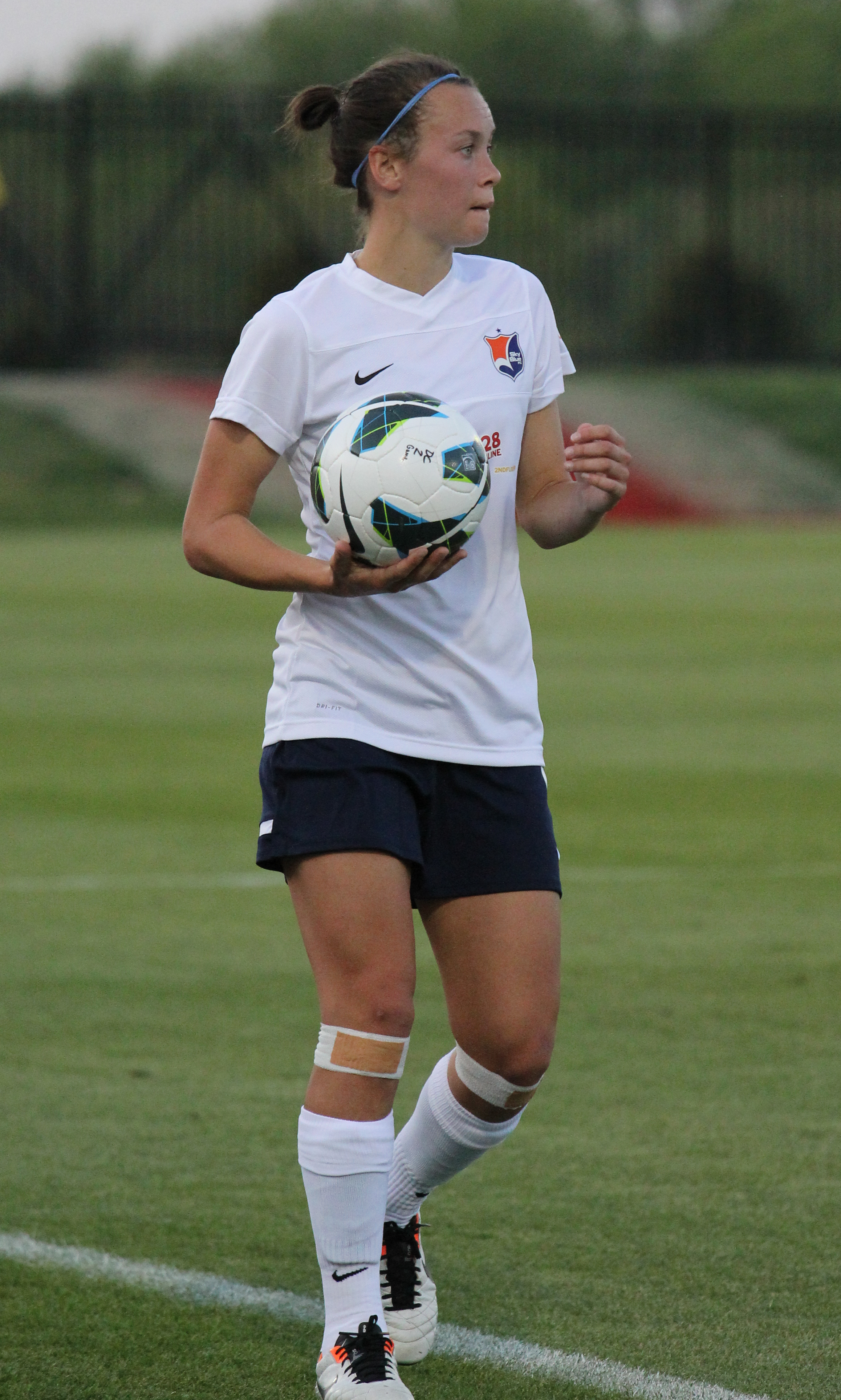 2013-04-27 Spirit - Sky Blue-78